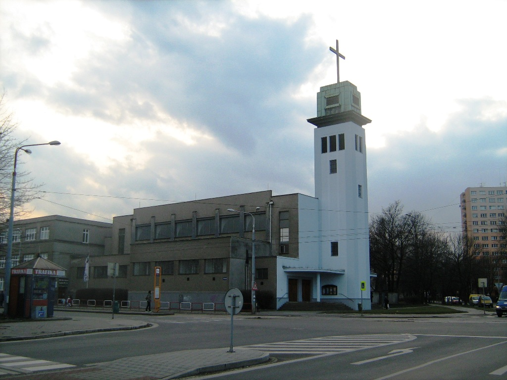 Kostel Svatého Josefa v Ostravě z roku 1936, Saleziánské středisko Don Bosco, Ostrava